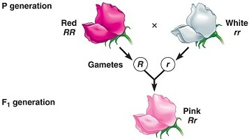 Un exemple de dominance incomplète. Le phénotype de la génération fille n'est ni celui du père, ni celui de la mère, mais un nouveau phénotype entre les deux.